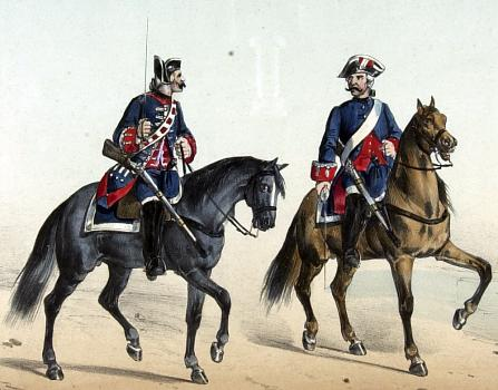 Guardias de corps de España en el siglo XVIII en un dibujo del Conde de Clonard, Serafín María de Sotto, realizado en el siglo XIX.